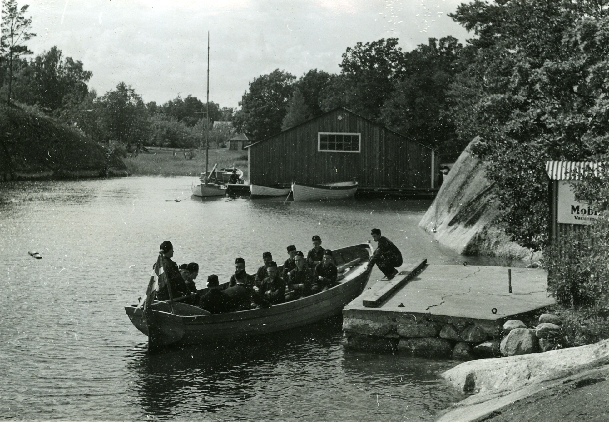 Aspiranter övar roddexercis vid Sjövärnskårens aspirantskola i Finnhamn.